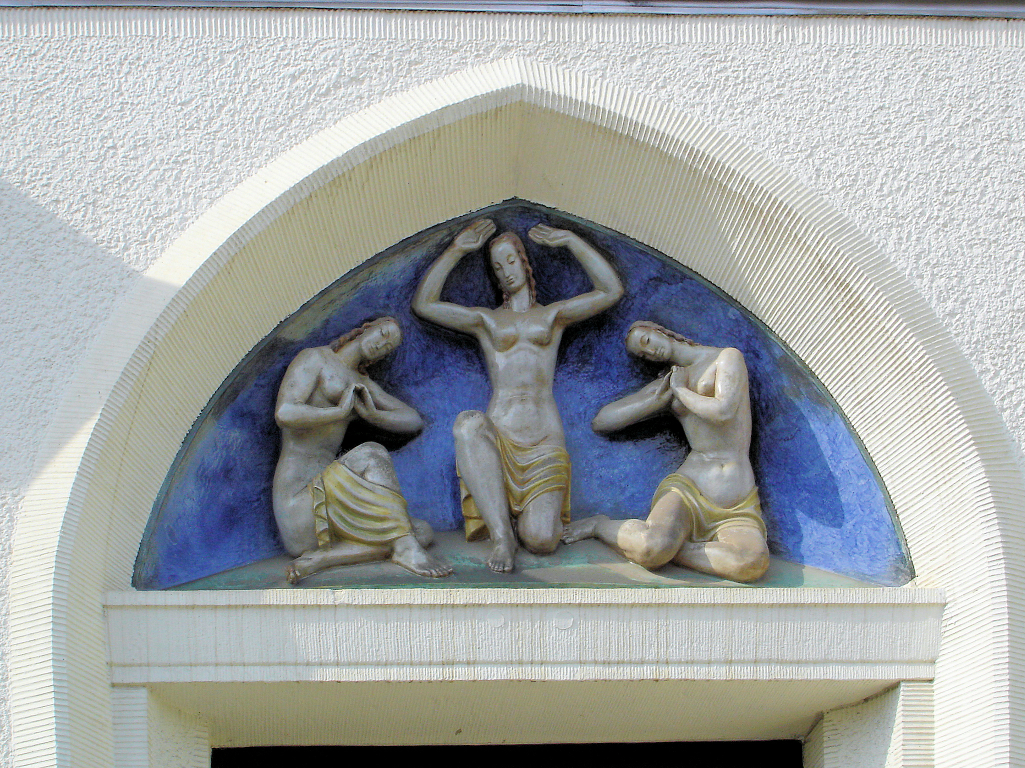 Tympanongestaltung, Blücherstraße Rostock, Drei-Figuren-Relief von Margarete Scheel 1926